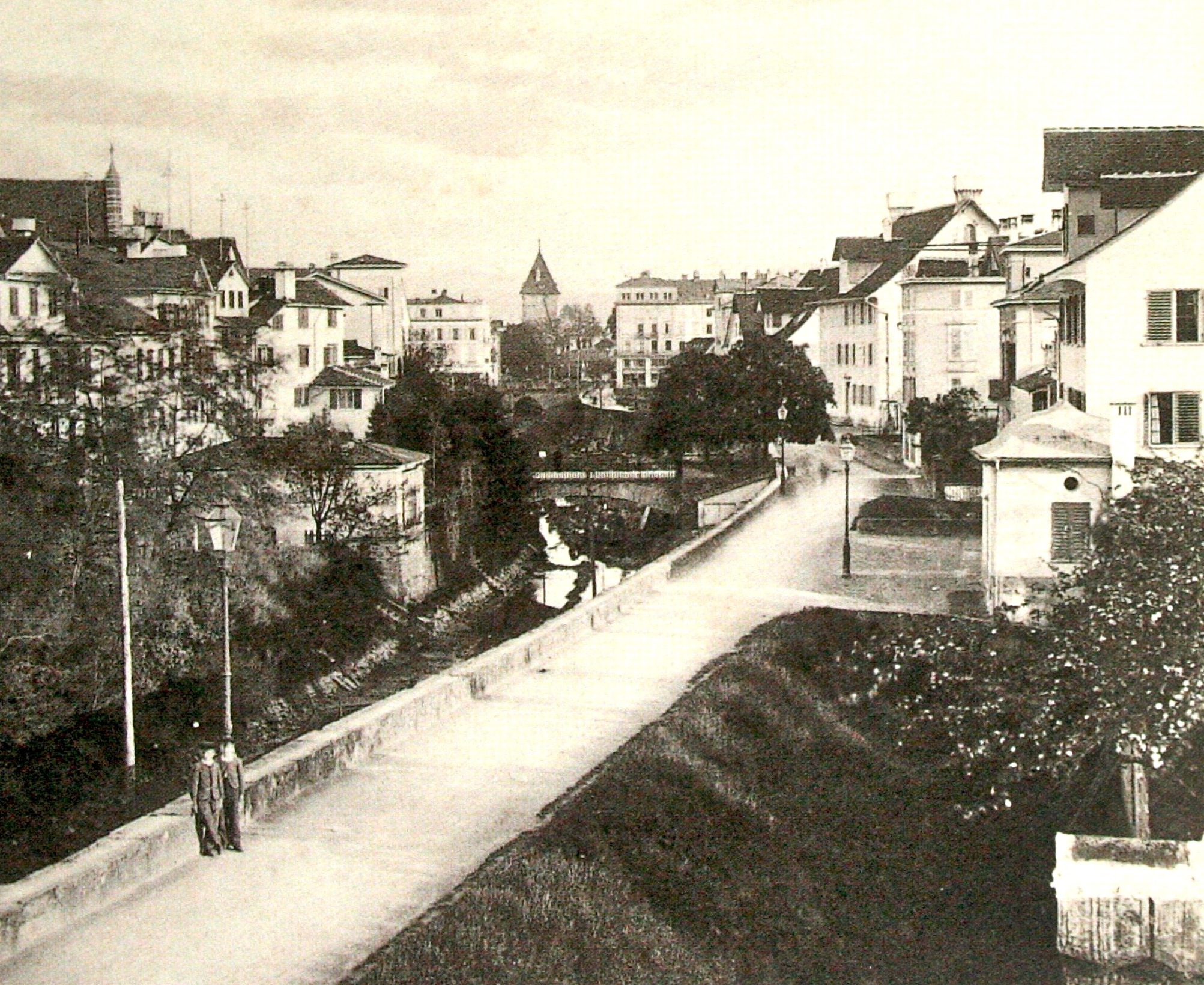 Mittlerer Fröschengraben mit Wall beim Rennwegbollwerk gegen Süden; rechts: "Brünneli" Bahnhofstrasse 67/Sihlstrasse 1, im Hintergrund der Kratzturm